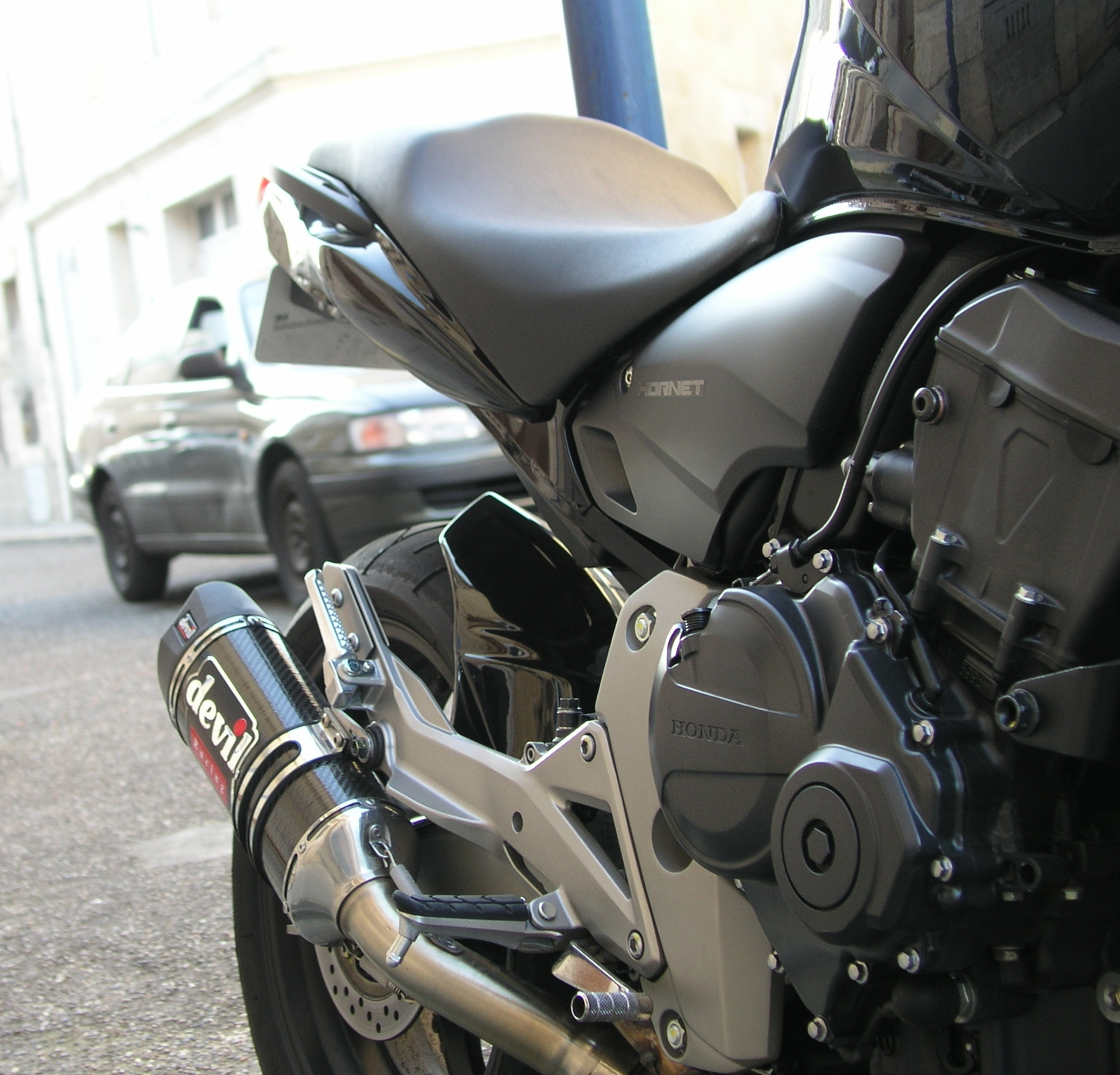 Honda 600 Hornet 2008